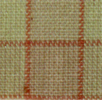 Toile paysane Photographer Isabelle Grosjean ZA Date 2001-11-01 License GFDL-self Camera Sony PSC-P92